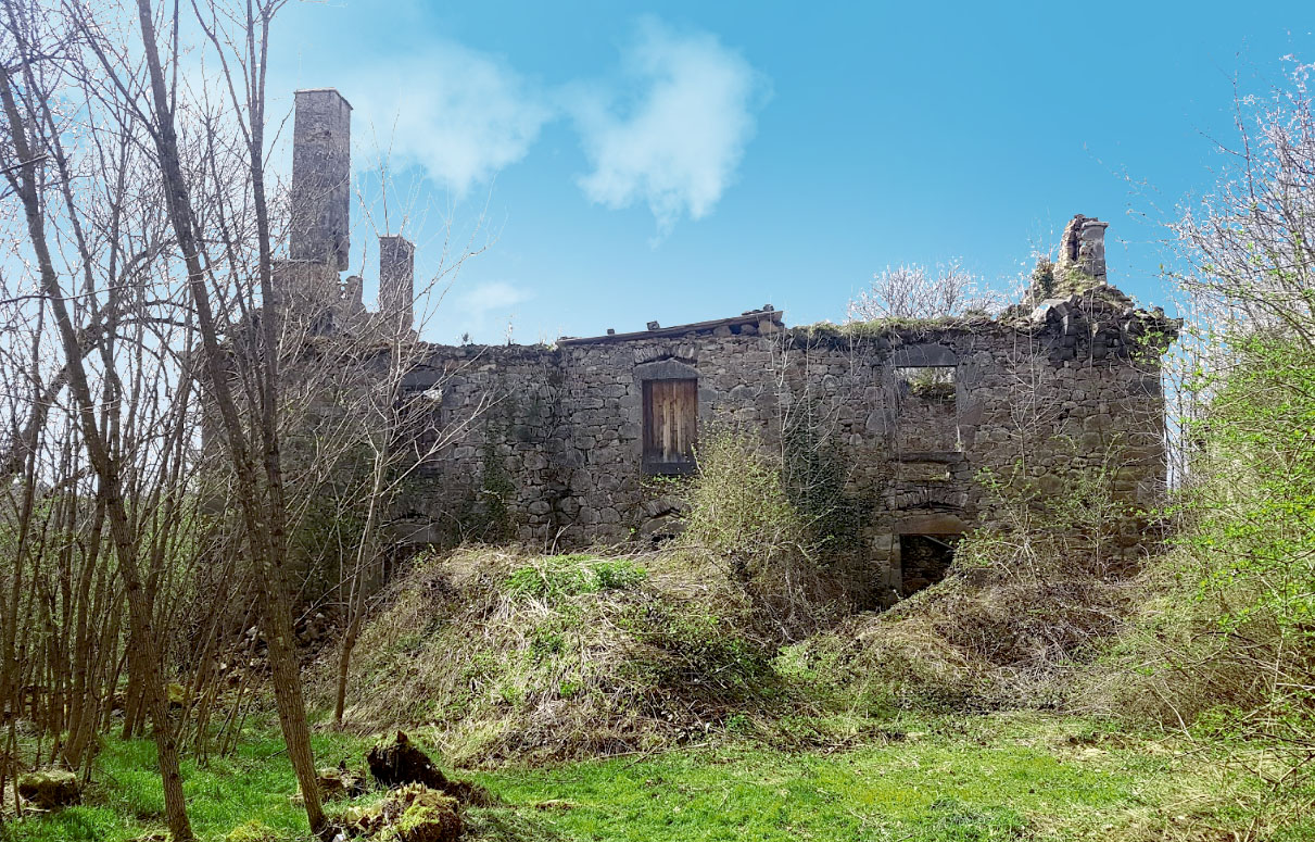 Ruines de château renaissance dans le Cantal